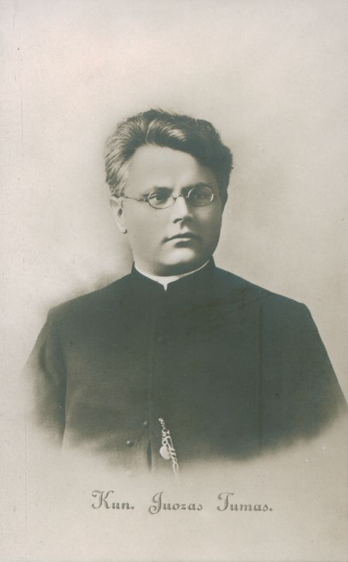 Postcard of Juozas Tumas-Vaižgantas